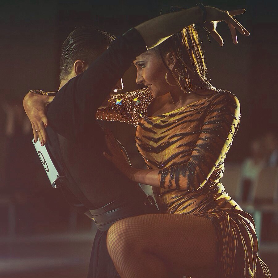 Ukrainian Championship